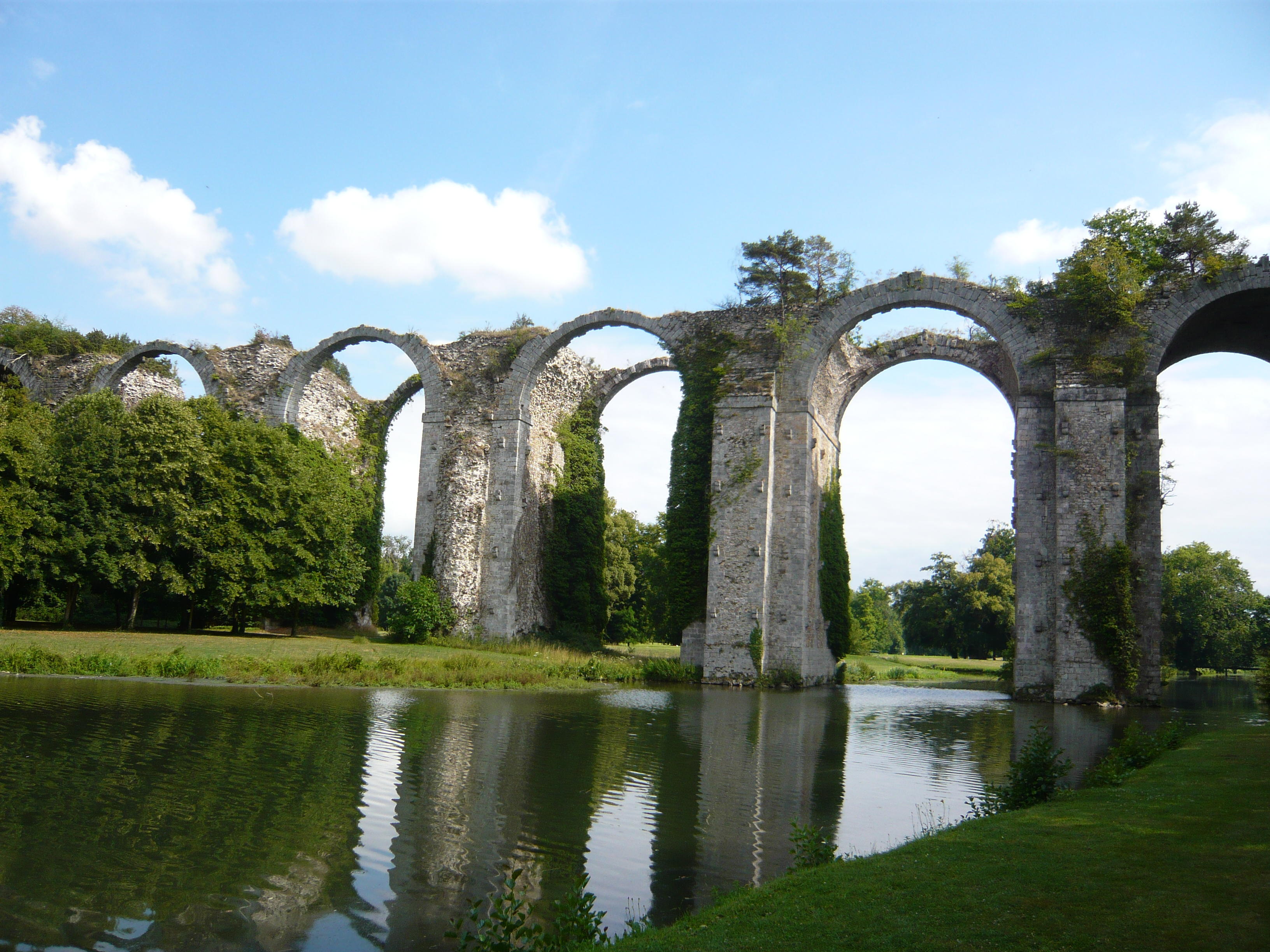 aqueduc du château de Maintenon, Eure-et-Loir, France.